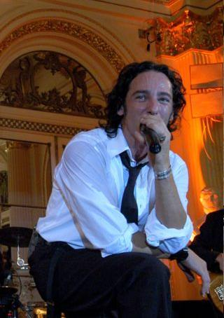 Detalle de Image:Javier Calamaro - Argentina - En Casa Rosada - 5MAY05 -presidenciagovar.jpg